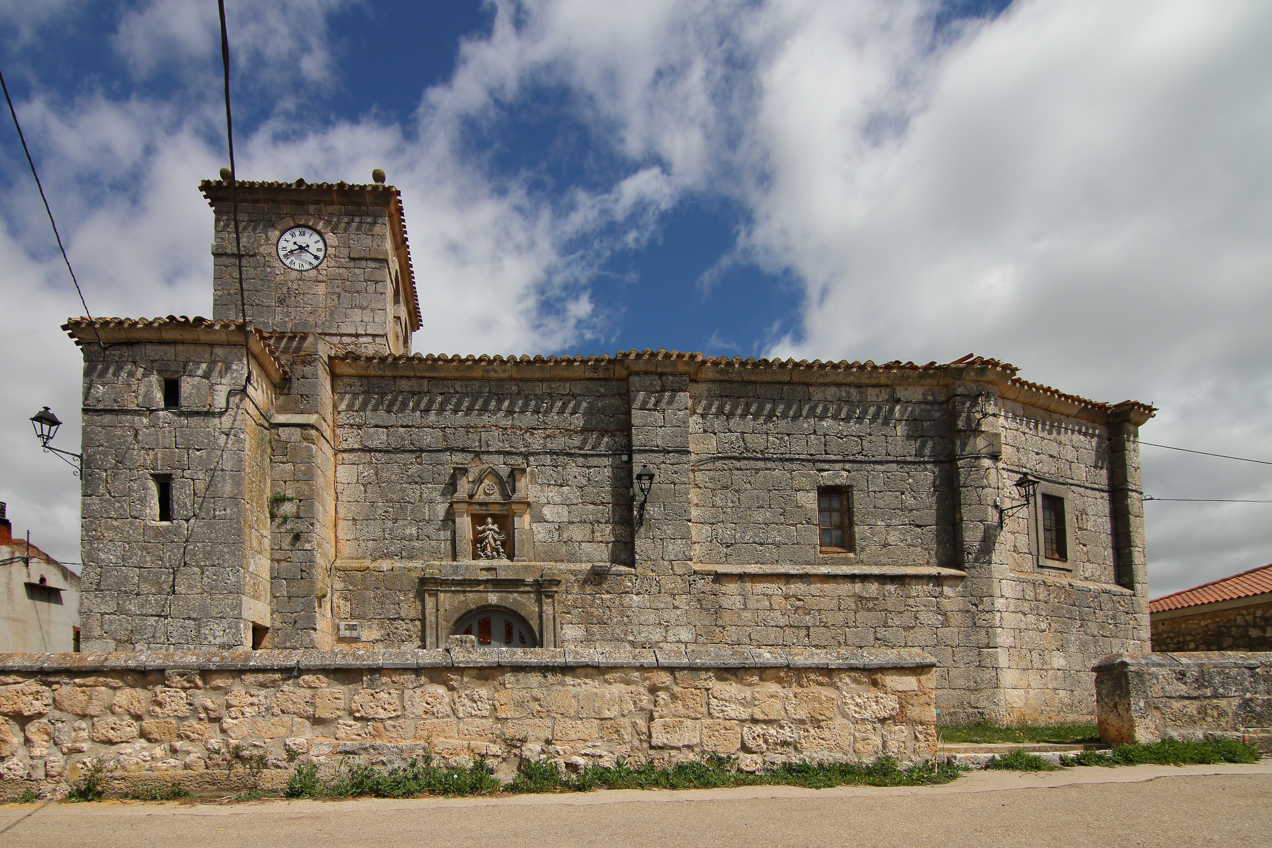 Modúbar de la Emparedada, Iglesia de la Asunción de Nuestra Señora, 02